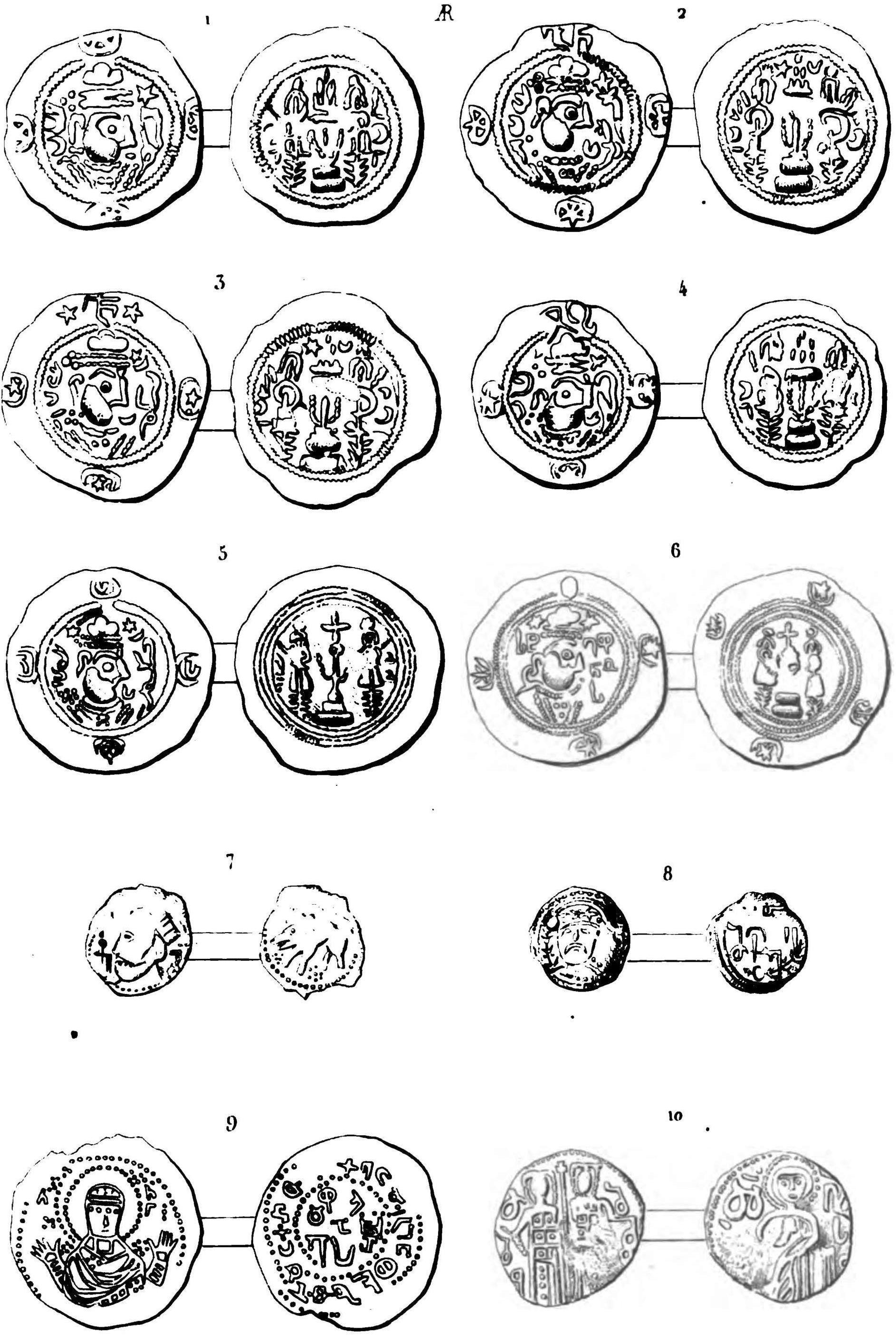 Victor Langlois. Monnaies Georgiennes. PL I.